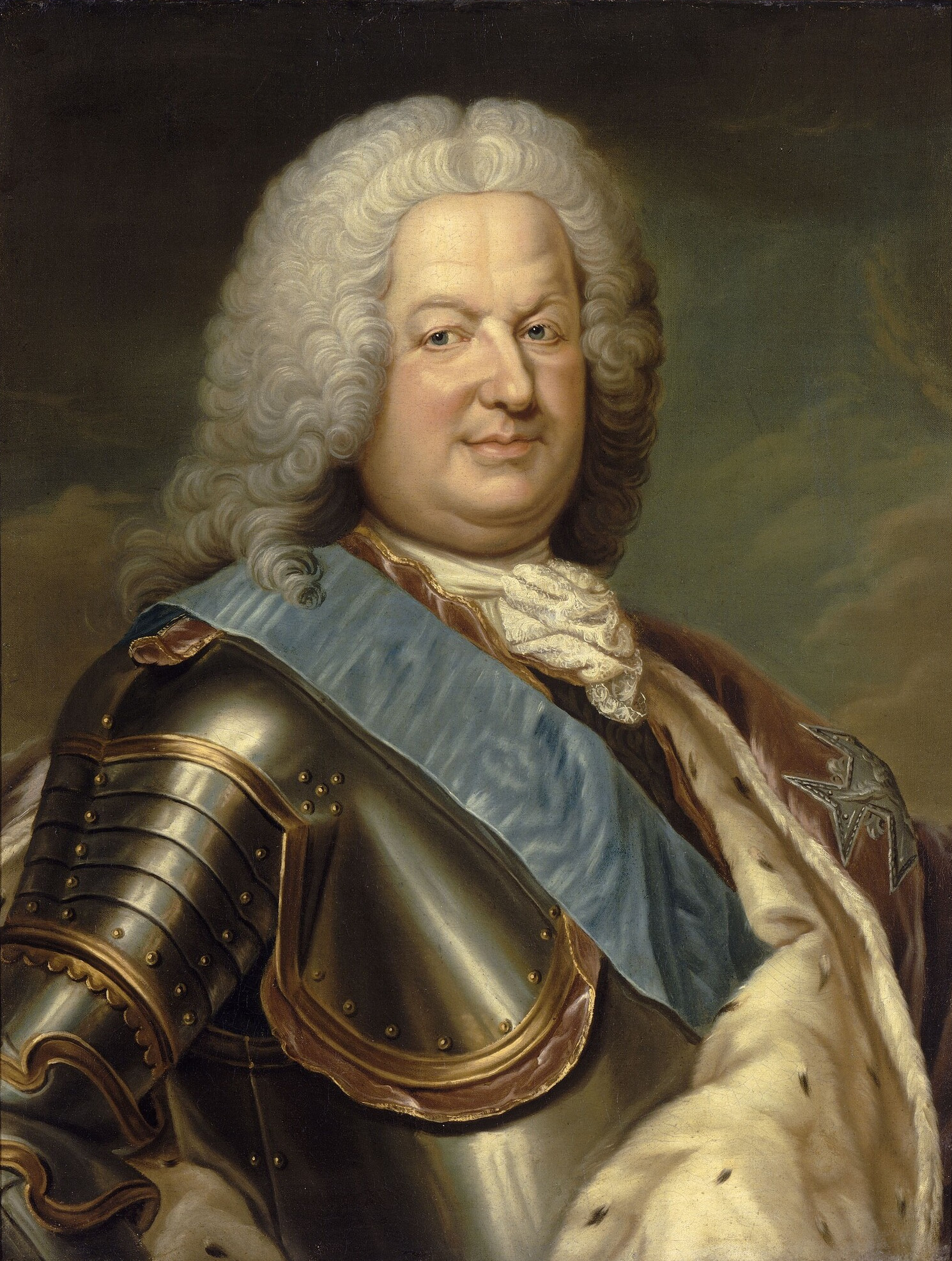 Portrait of Stanisław Leszczyński (1677-1766)